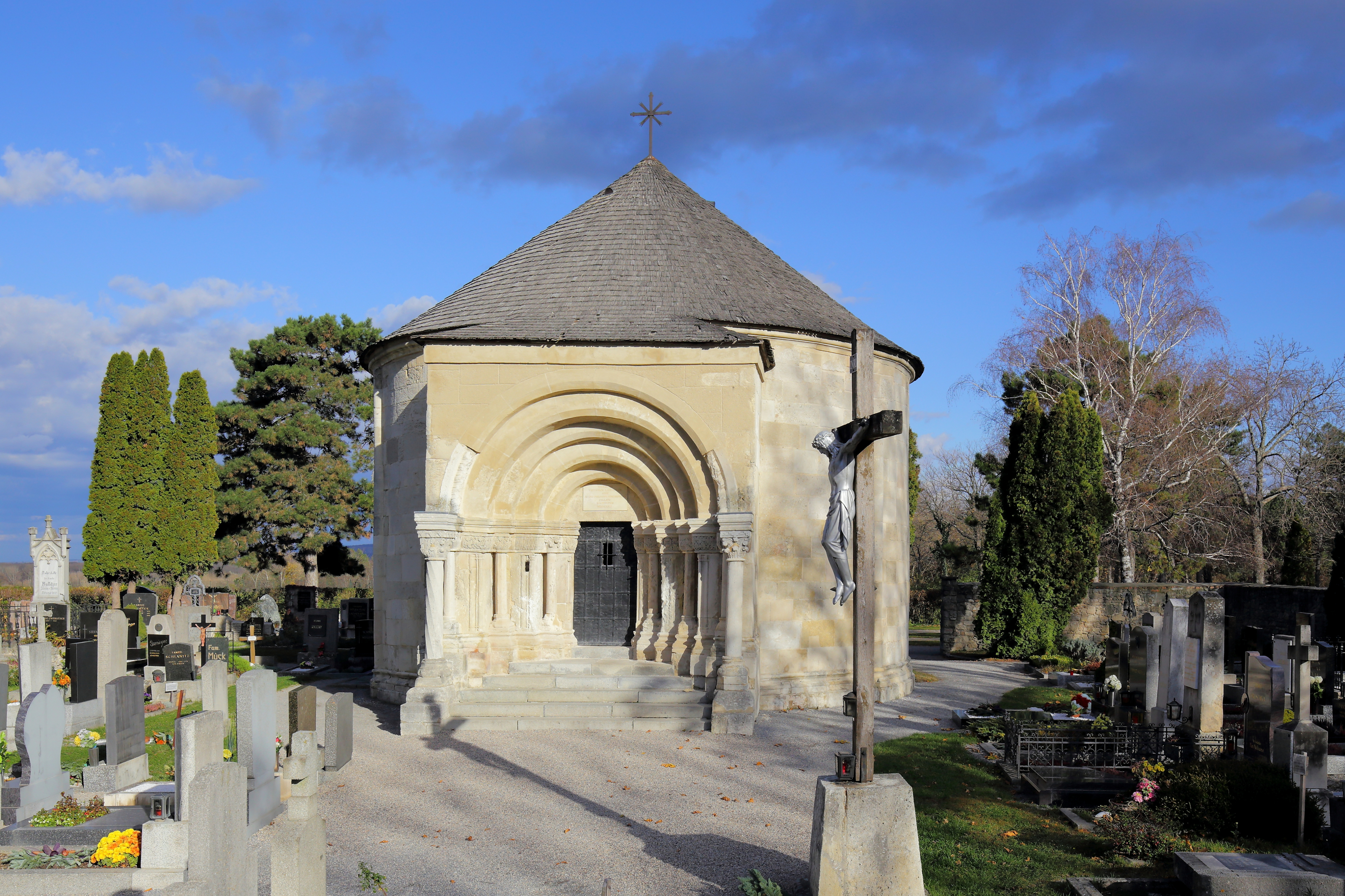 Südwestansicht des Karners am Friedhof in der niederösterreichischen Marktgemeinde Bad Deutsch-Altenburg.Der romanische Rundbau mit halbkreisförmiger Apsis und westseitigem, fünffach gestuftem Trichterportalvorbau wurde im 12./13. Jahrhundert errichtet.